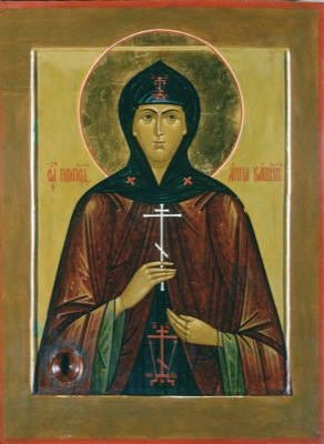 Прп. Анна Кашинская. Икона. Россия. Конец XIX - начало XX в.